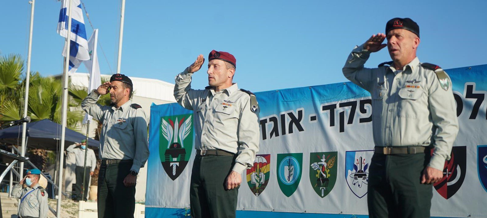 טקס חילופי מפקד עוצבת געש , מימין לשמאל: המפקד היוצא ,תא"ל אבי גיל , אלוף פיקוד הצפון, אמיר ברעם והמפקד הנכנס תא"ל דן נוימן